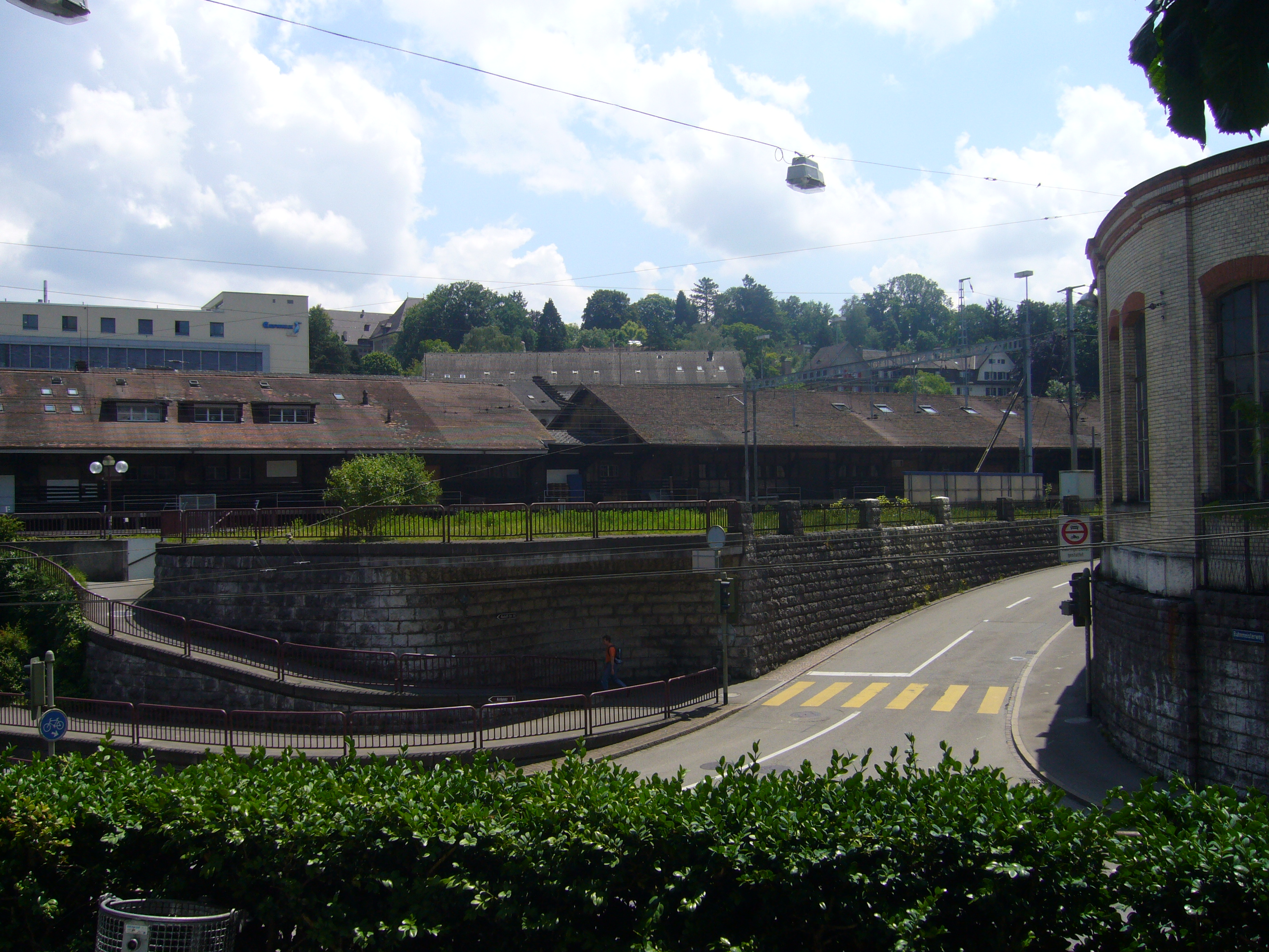 Einmündung des Bahnmeisterwegs in die Zürcherstrasse beim Hauptbahnhof Winterthur. Heute mündet der Bahnmeisterweg seit der Eröffnung des Kesselhauses als Einkaufszentrum nicht mehr in die Zürcherstrasse sondern endet in einem Platz vor dem Kesselhaus.